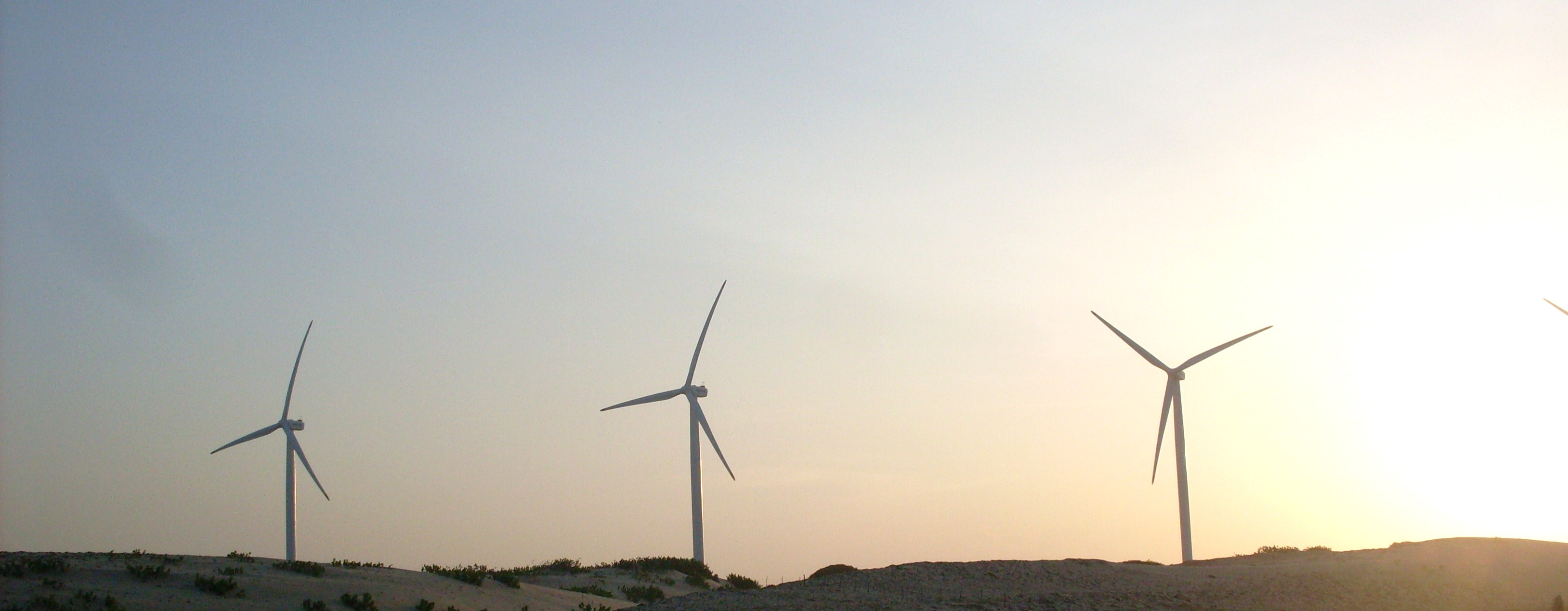 Cataventos da Taíba by Heitor Maia